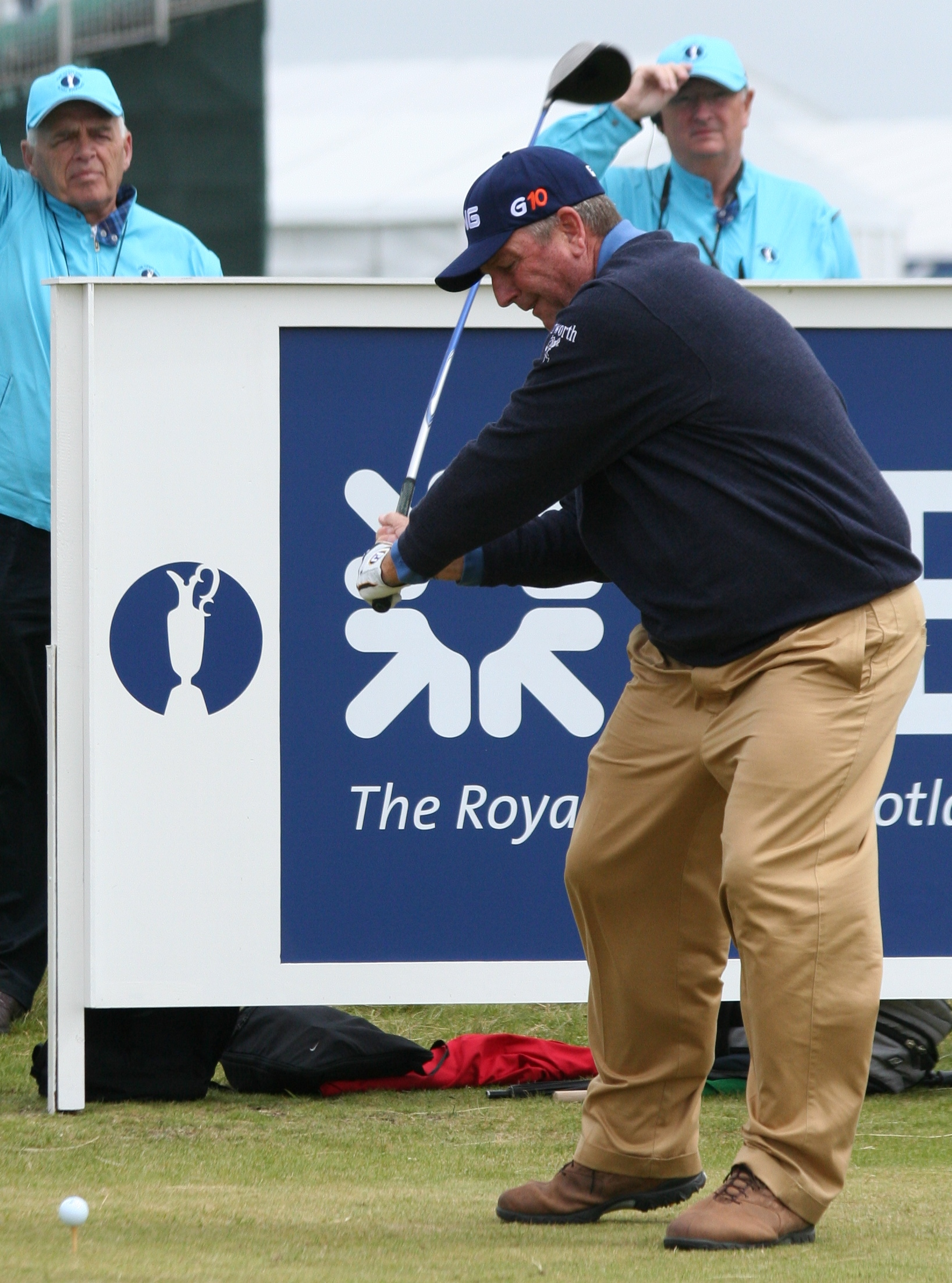 Mark Calcavecchia